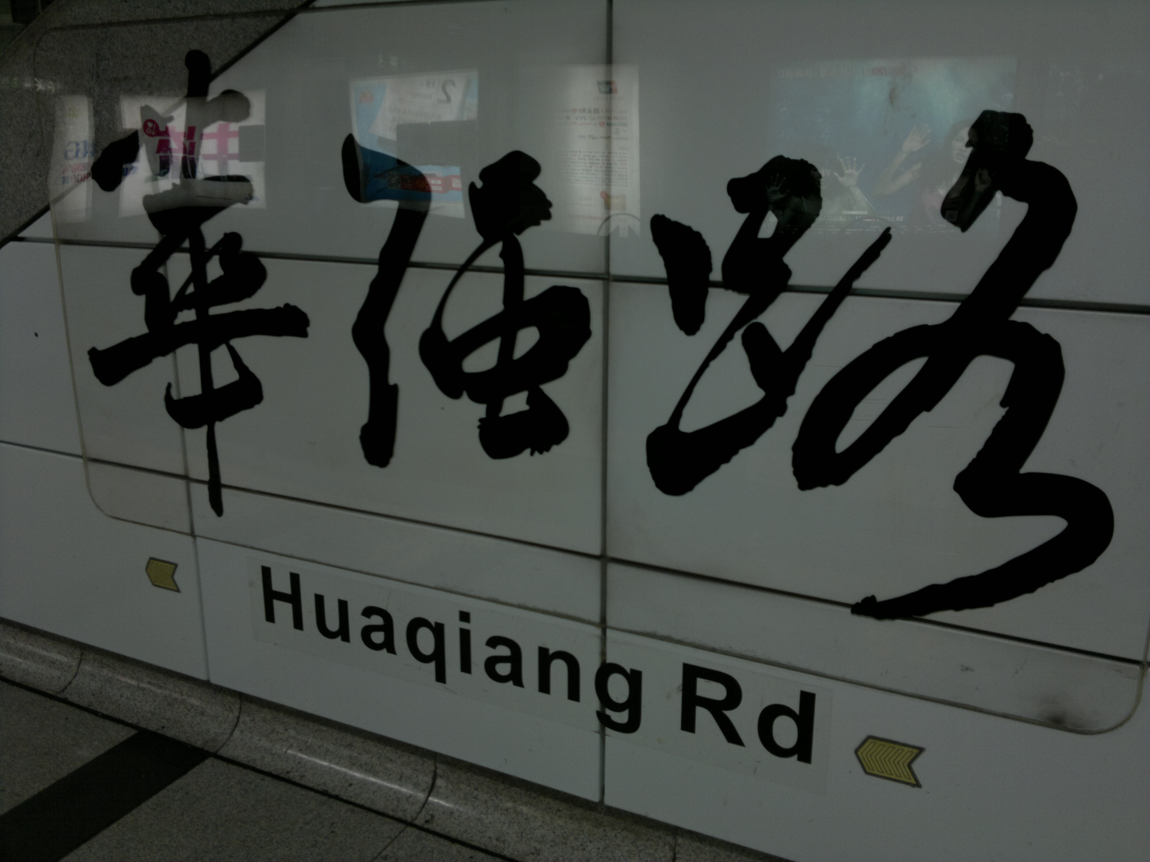 华强路站台书法大字